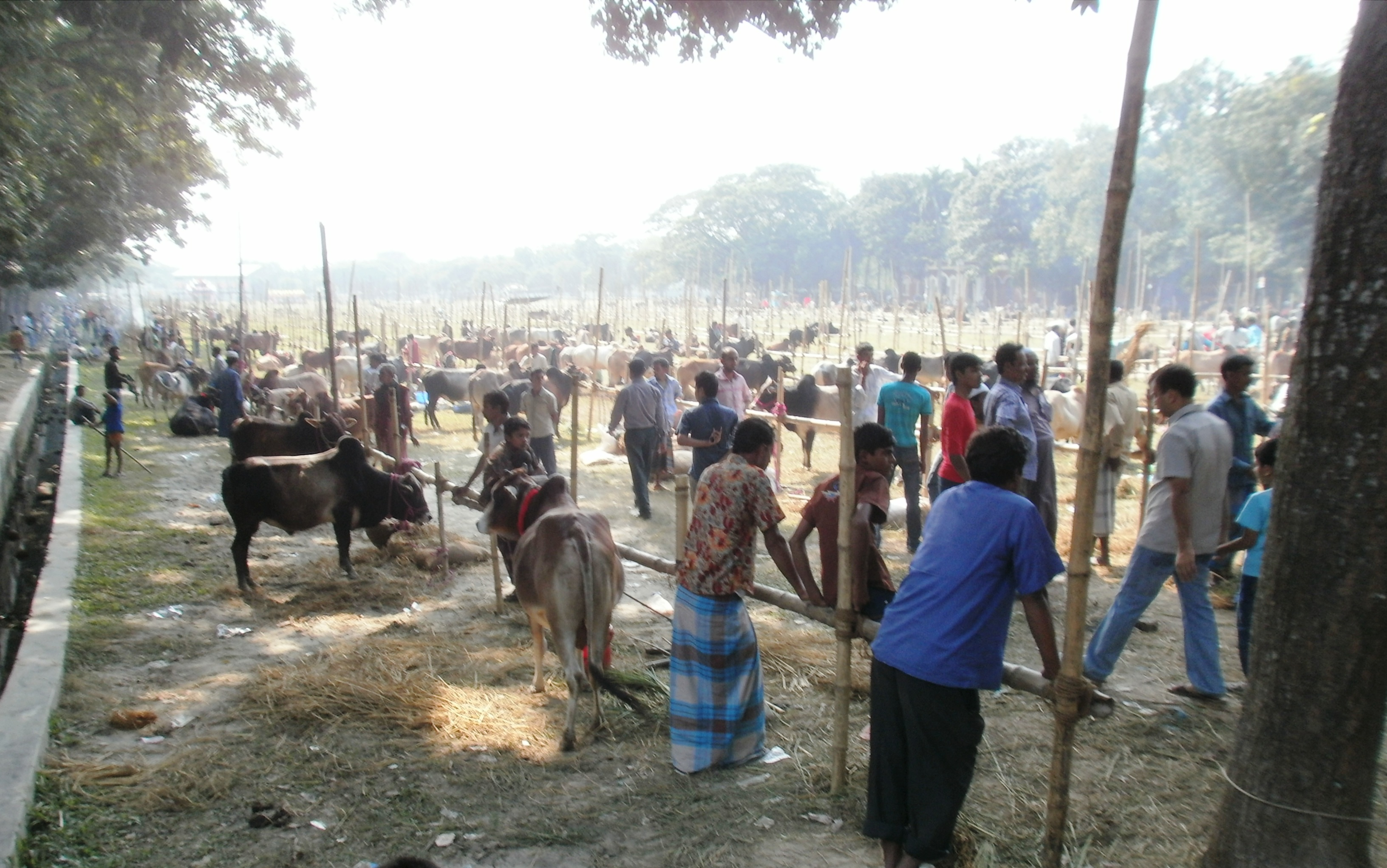 কুরবানির পশুর হাট, ২০১১